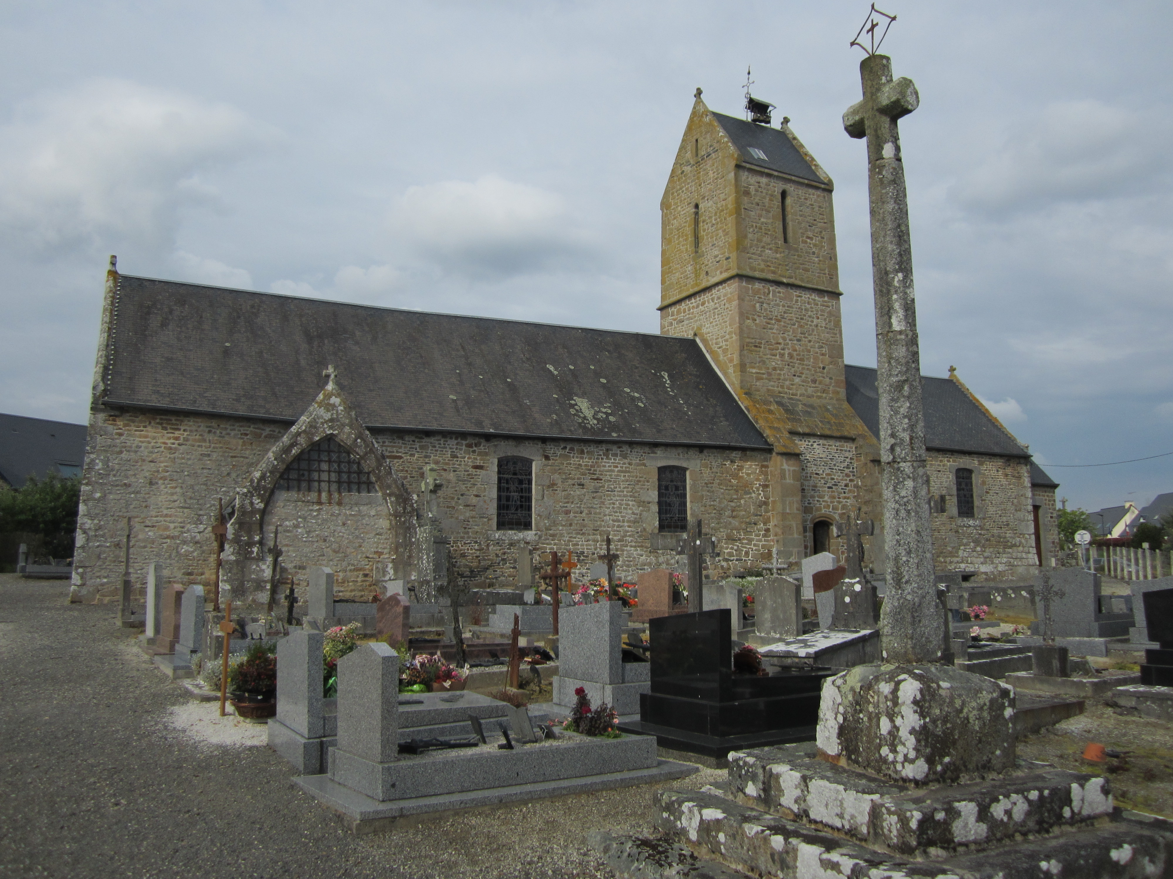 Ronthon, Manche